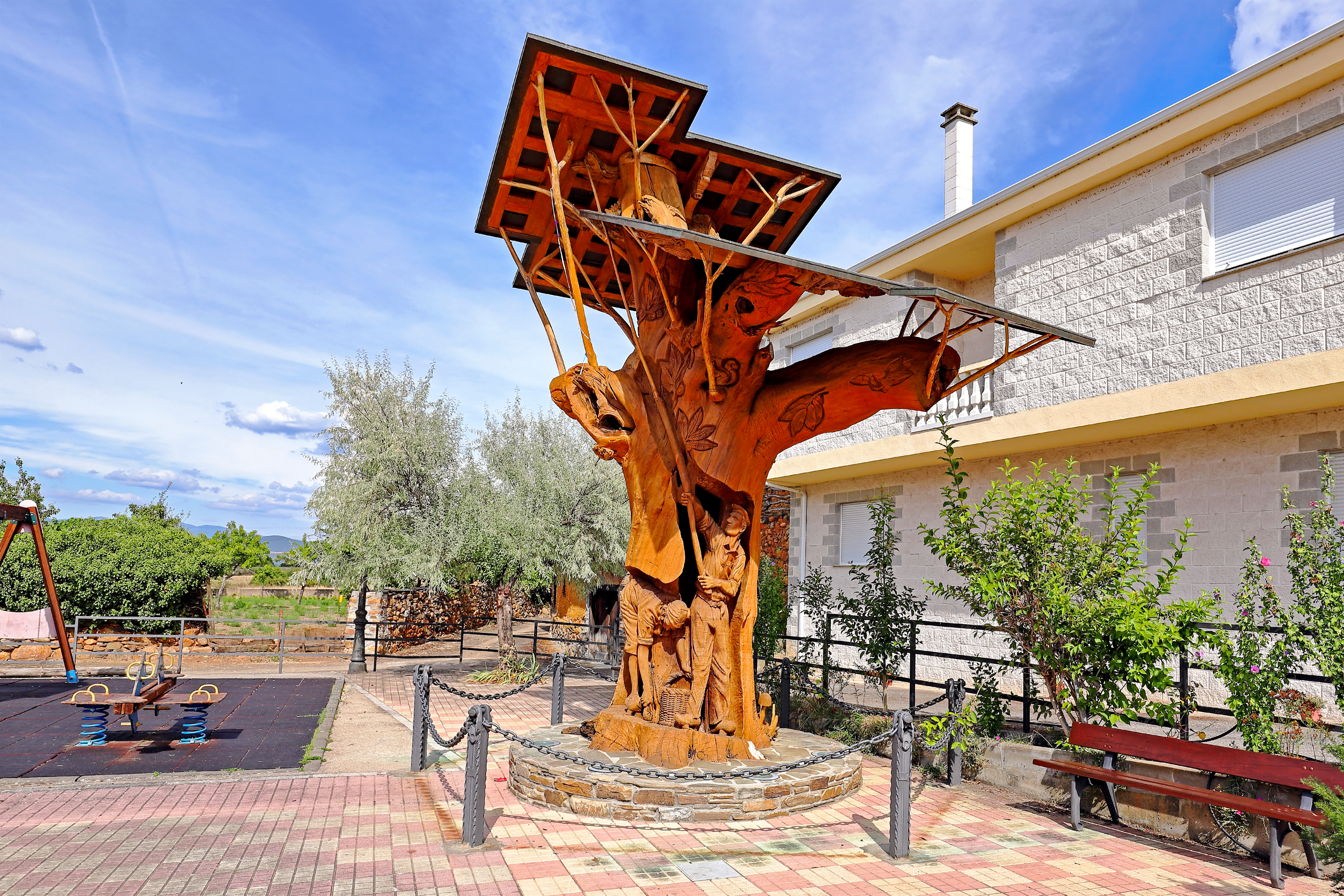 San Pedro Castañero es una localidad que pertenece al municipio de Castropodame en la comarca de El Bierzo, provincia de León.